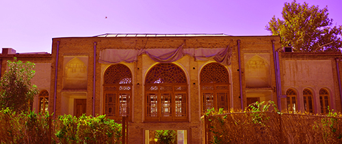 بنای دوره قاجاریه/ کاخ سلیمانیه